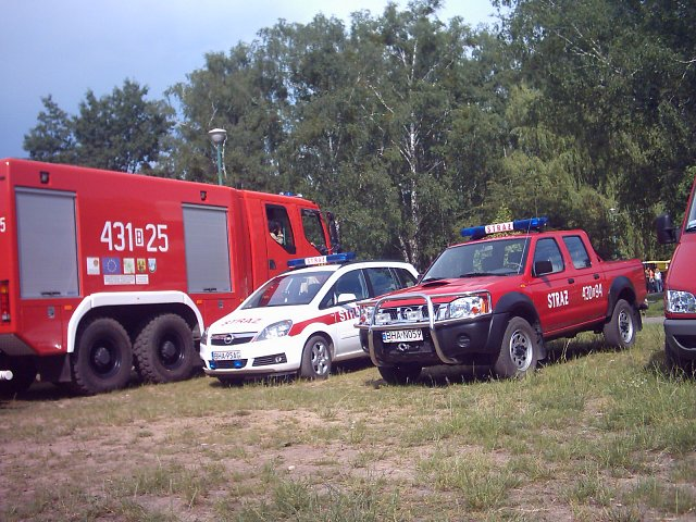 Wozy strażackie.